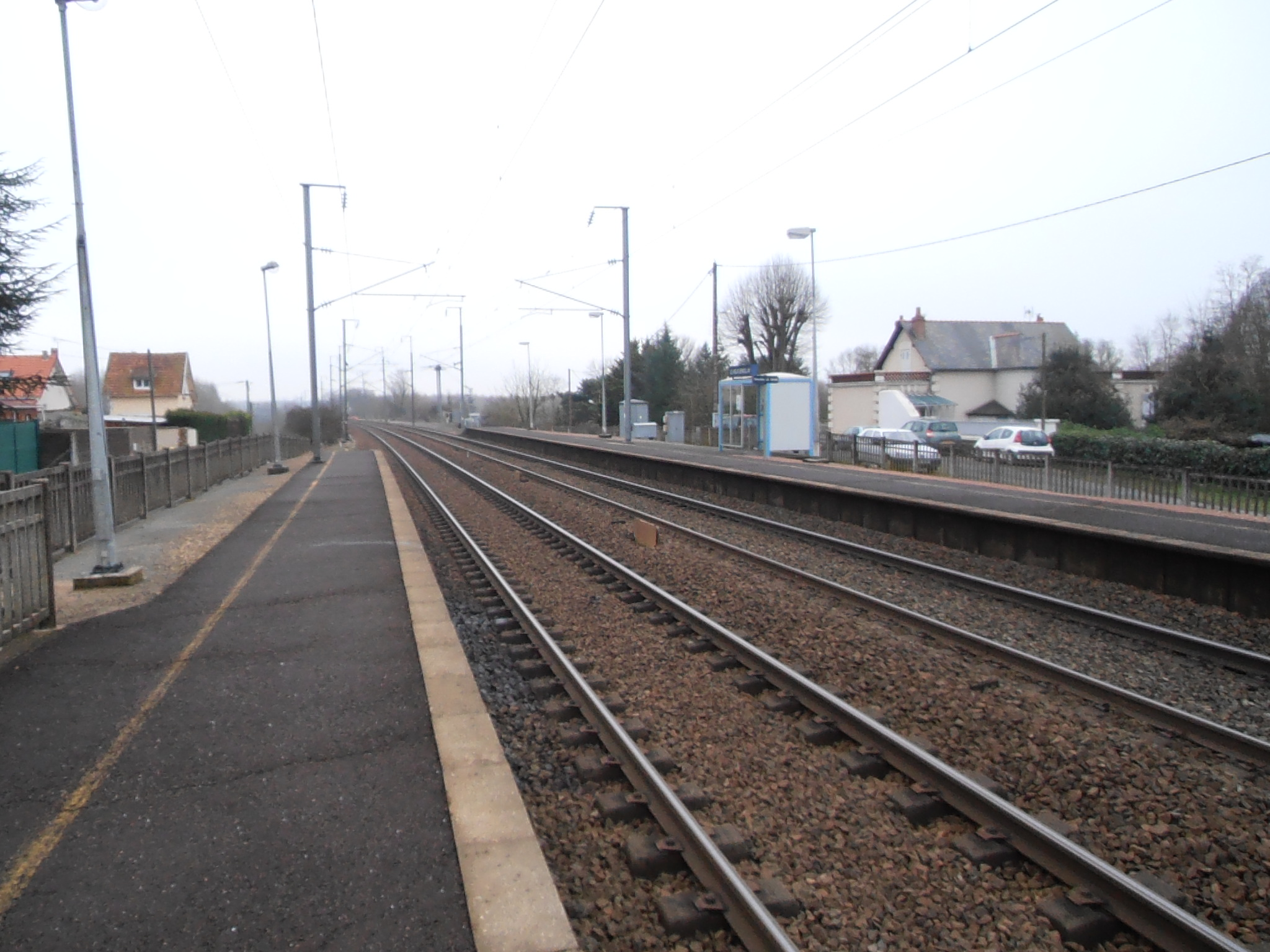 Les quais et les voies, en direction d'Angers, de la gare du Vieux-Briollay, située sur la commune de Briollay (Maine-et-Loire, France).